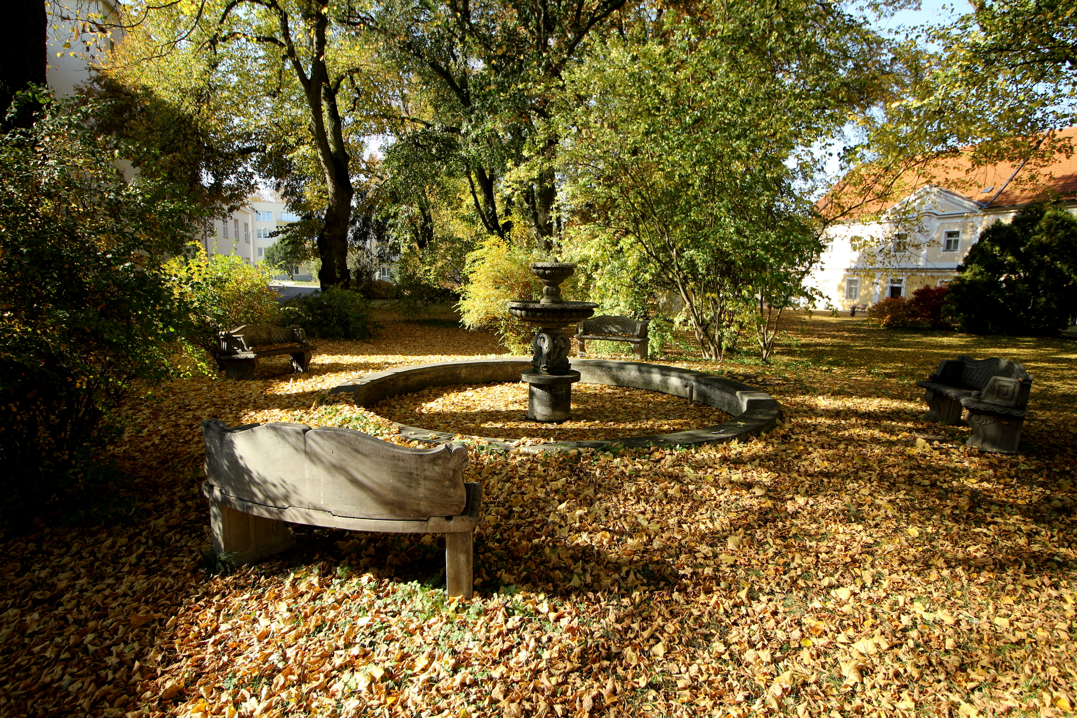 Opařany, okres Tábor